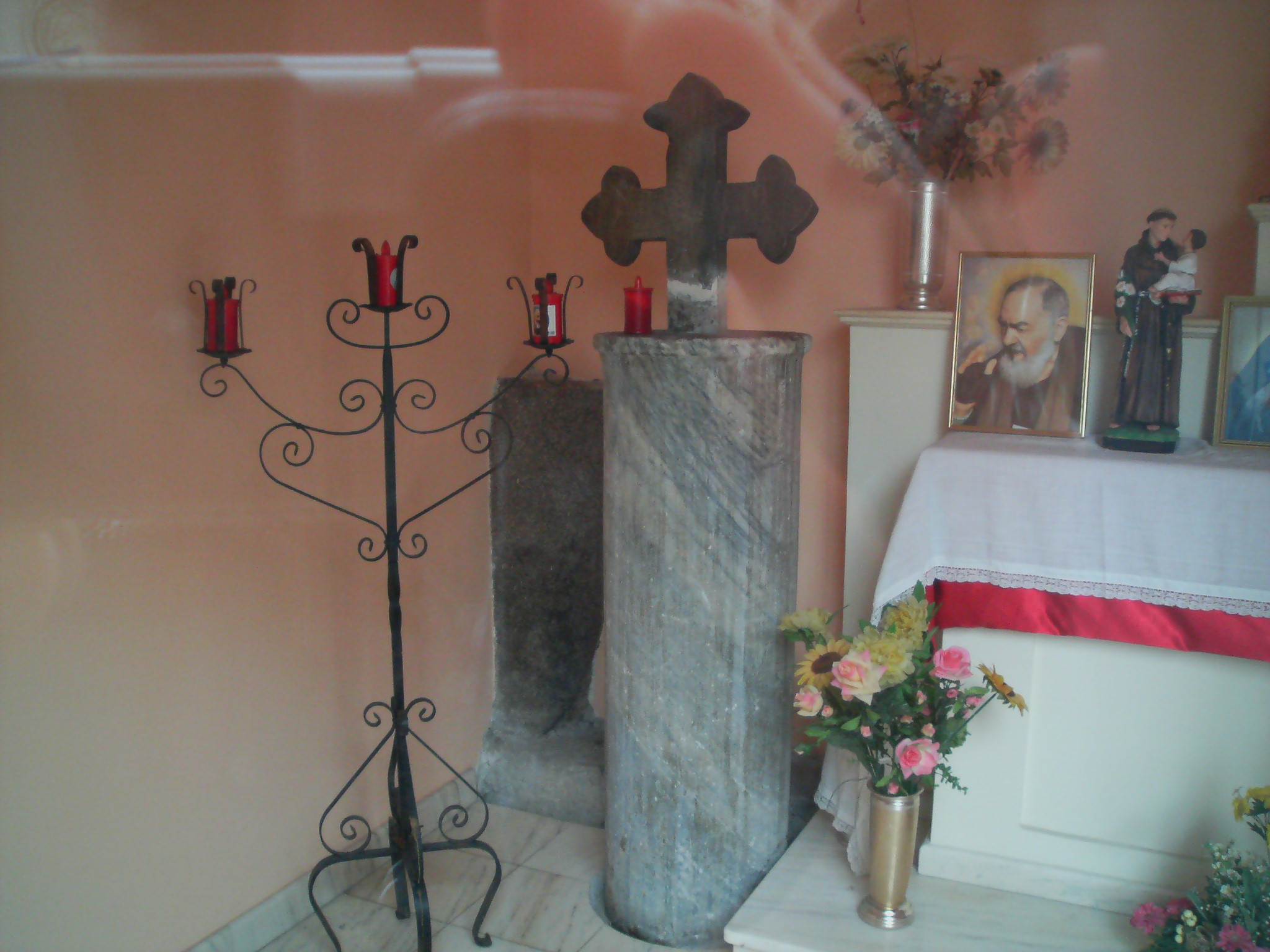 La colonna dove San Pietro, durante il suo viaggio verso Roma, facendo tappa all'antica Capua, si fermò a riposare (Santa Maria Capua Vetere).